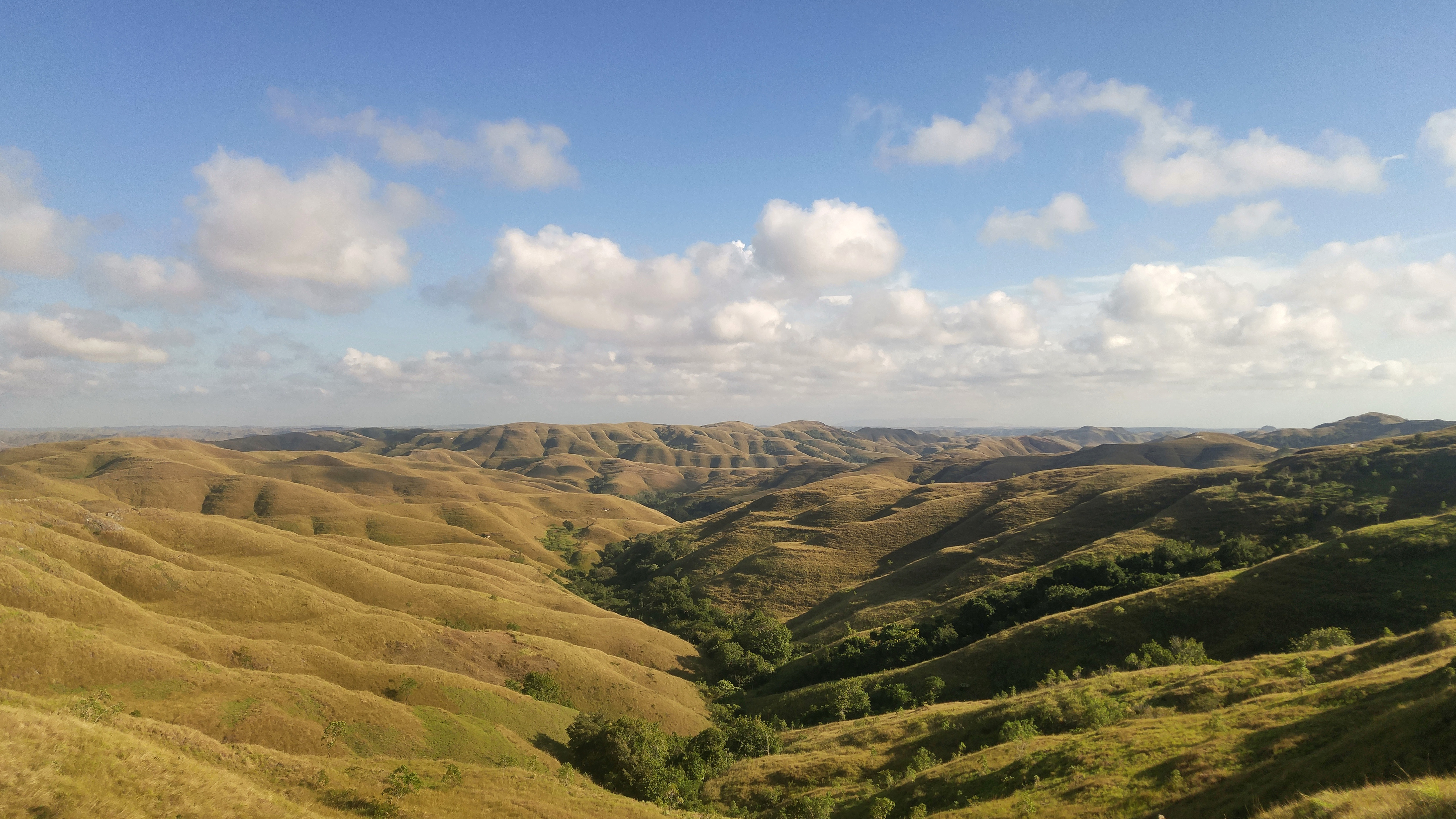 Bukit Wairinding terletak di Kabupaten Sumba Timur, Nusa Tenggara Timur, Indonesia. Letaknya sekitar 30 KM dari Kota Waingapu